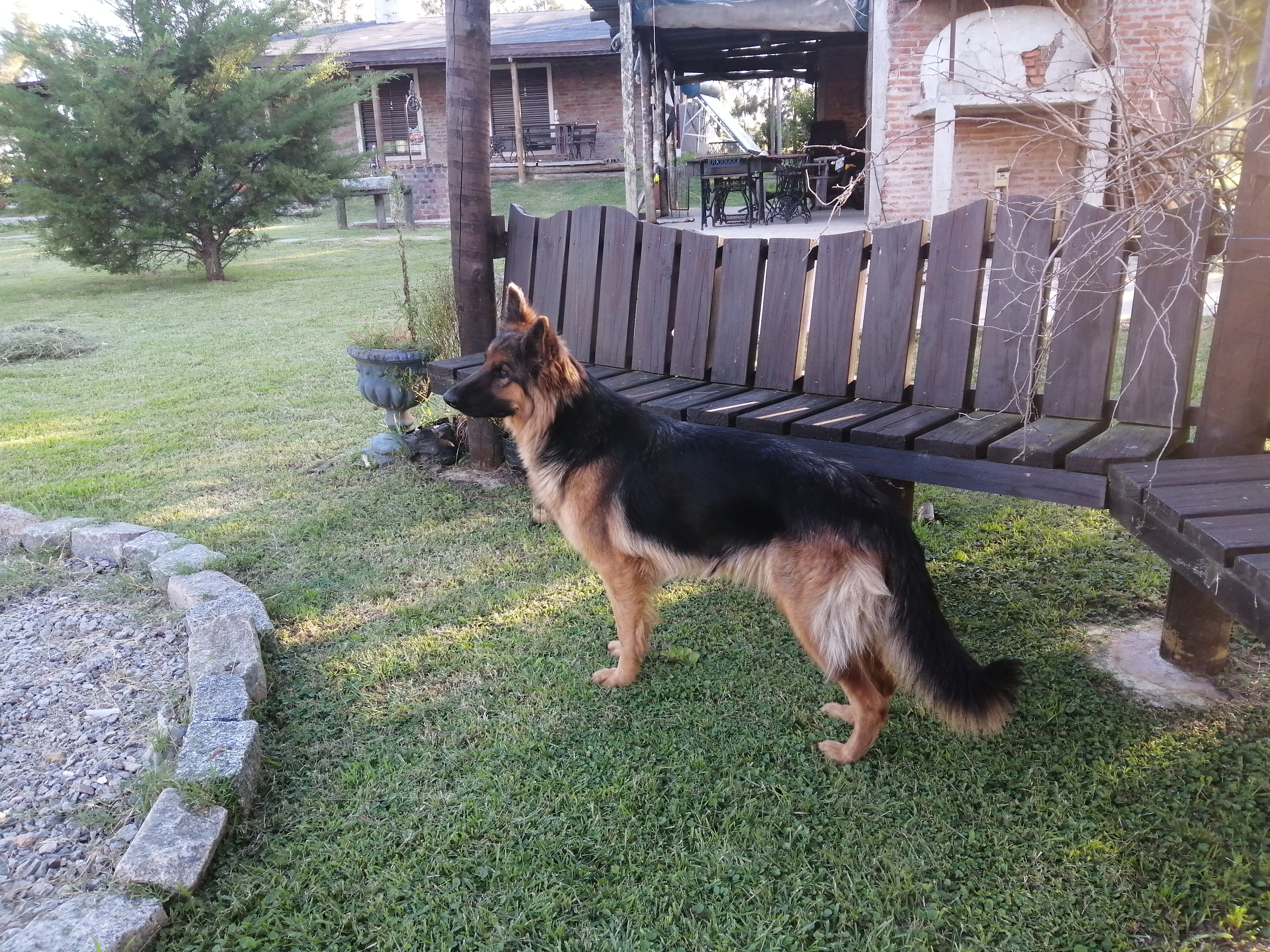 Hembra de tres años de edad. Libre de displasia.